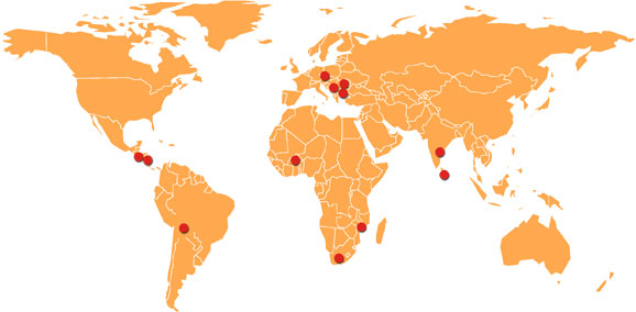 Übersicht über das internationale Engagement des SAH